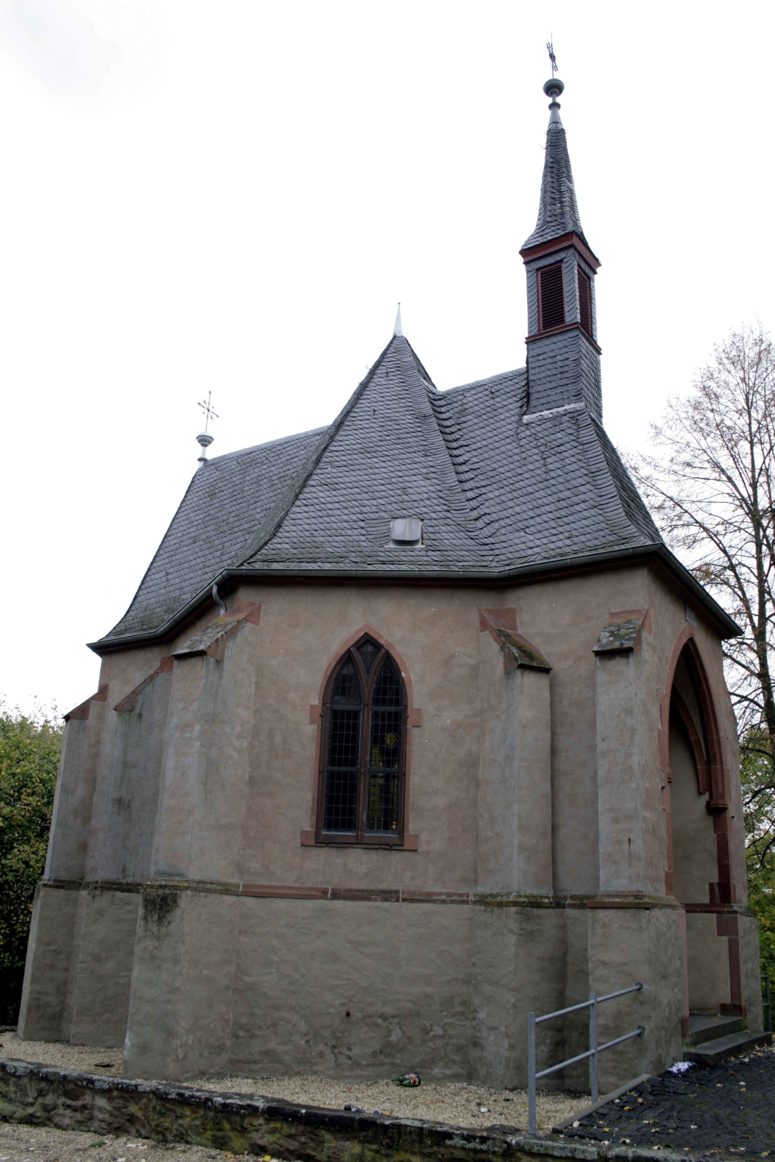 Johanneskapelle in Elz, Deutschland